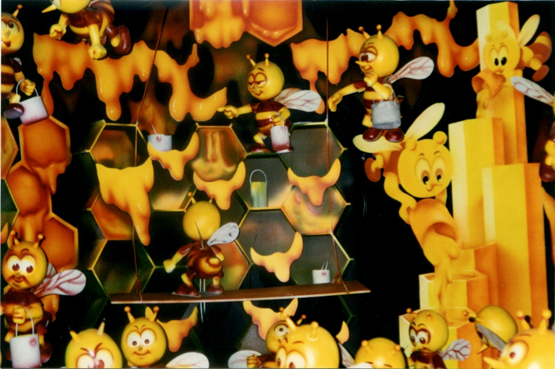 MeliparkApirama